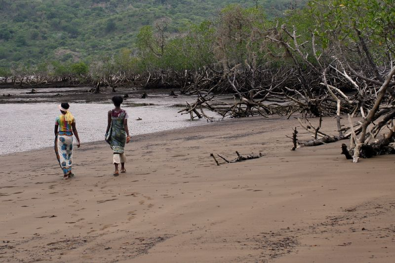 Deux Mahoraises sur la plage de Dapani.